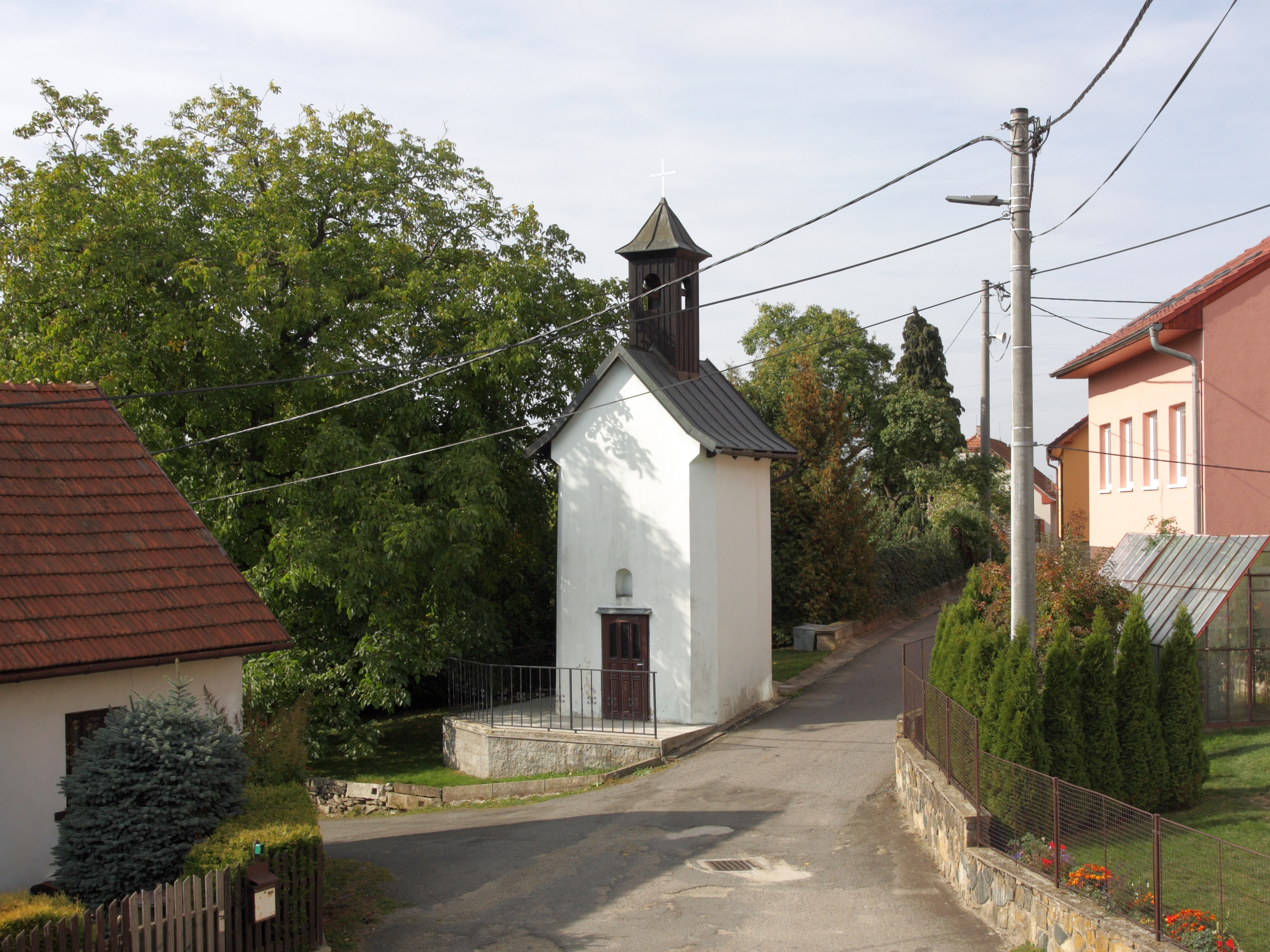 Střítež (okres Žďár nad Sázavou) - kaple Ducha Svatého.